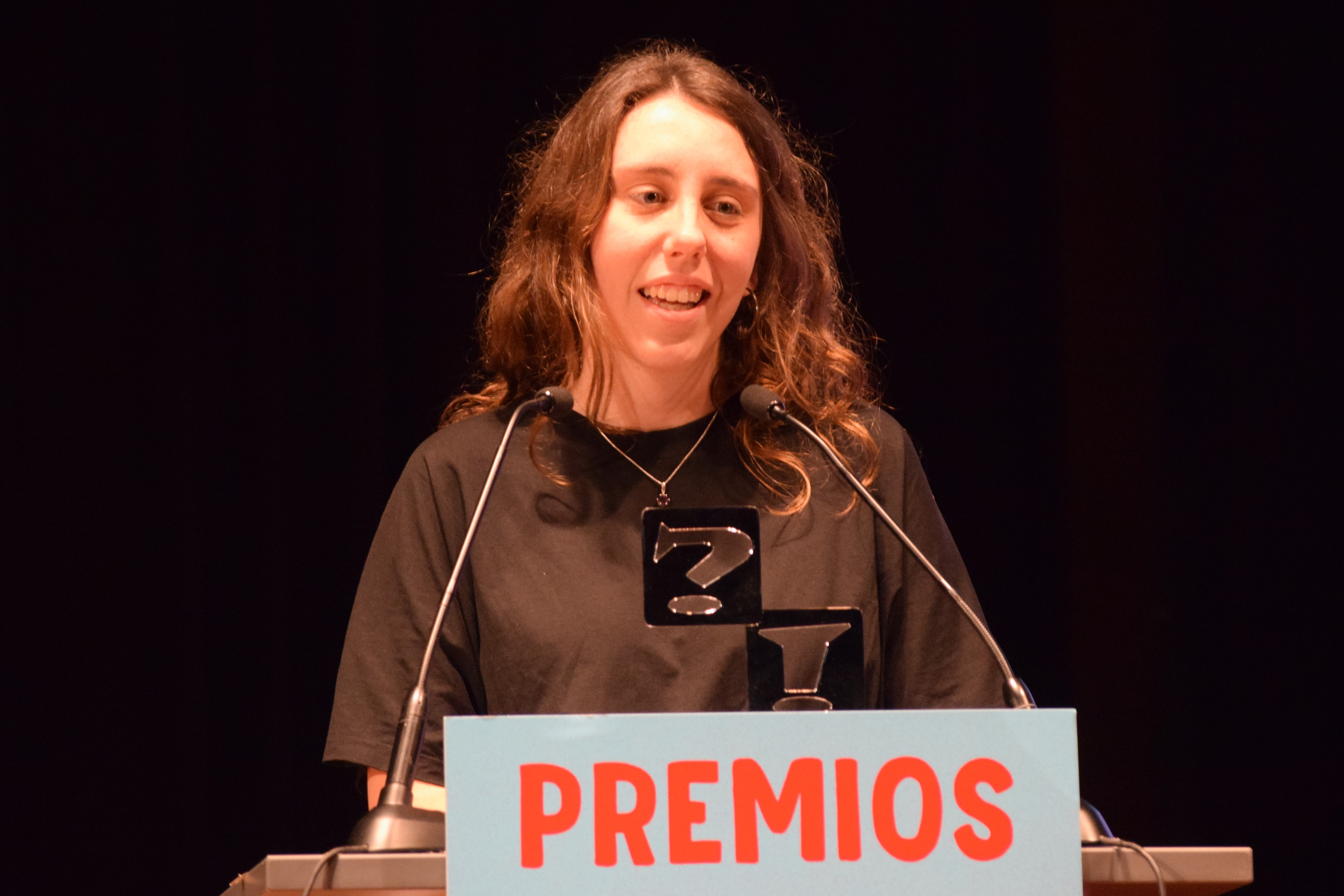 L'autora de còmics María Medem durant la cerimònia d'entrega els premis del 37. Còmic Barcelona. Medem fou proclamada autora revelació per la novel·la gràfica Cénit (Apa Apa). 2019.